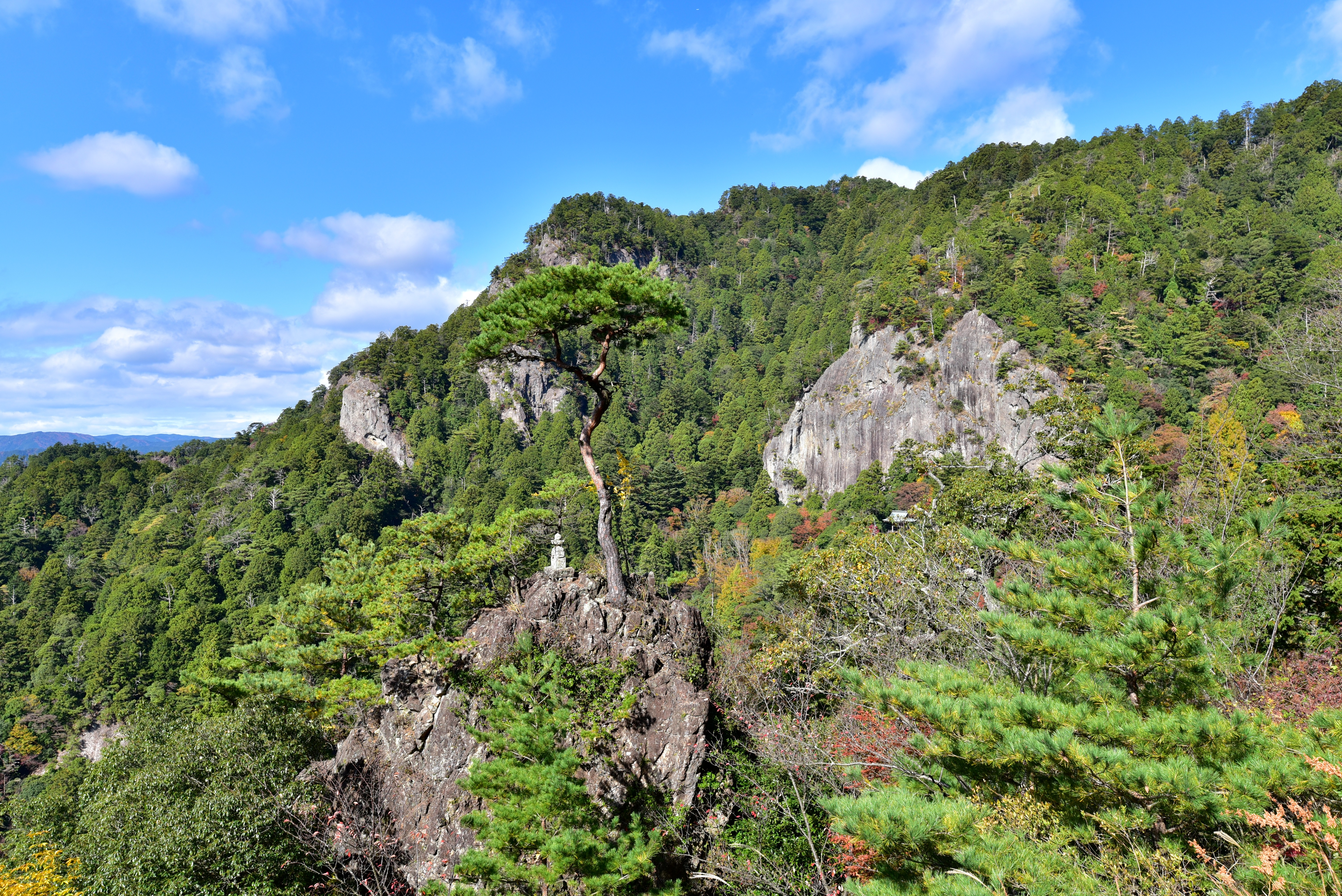 紅葉の鳳来寺山